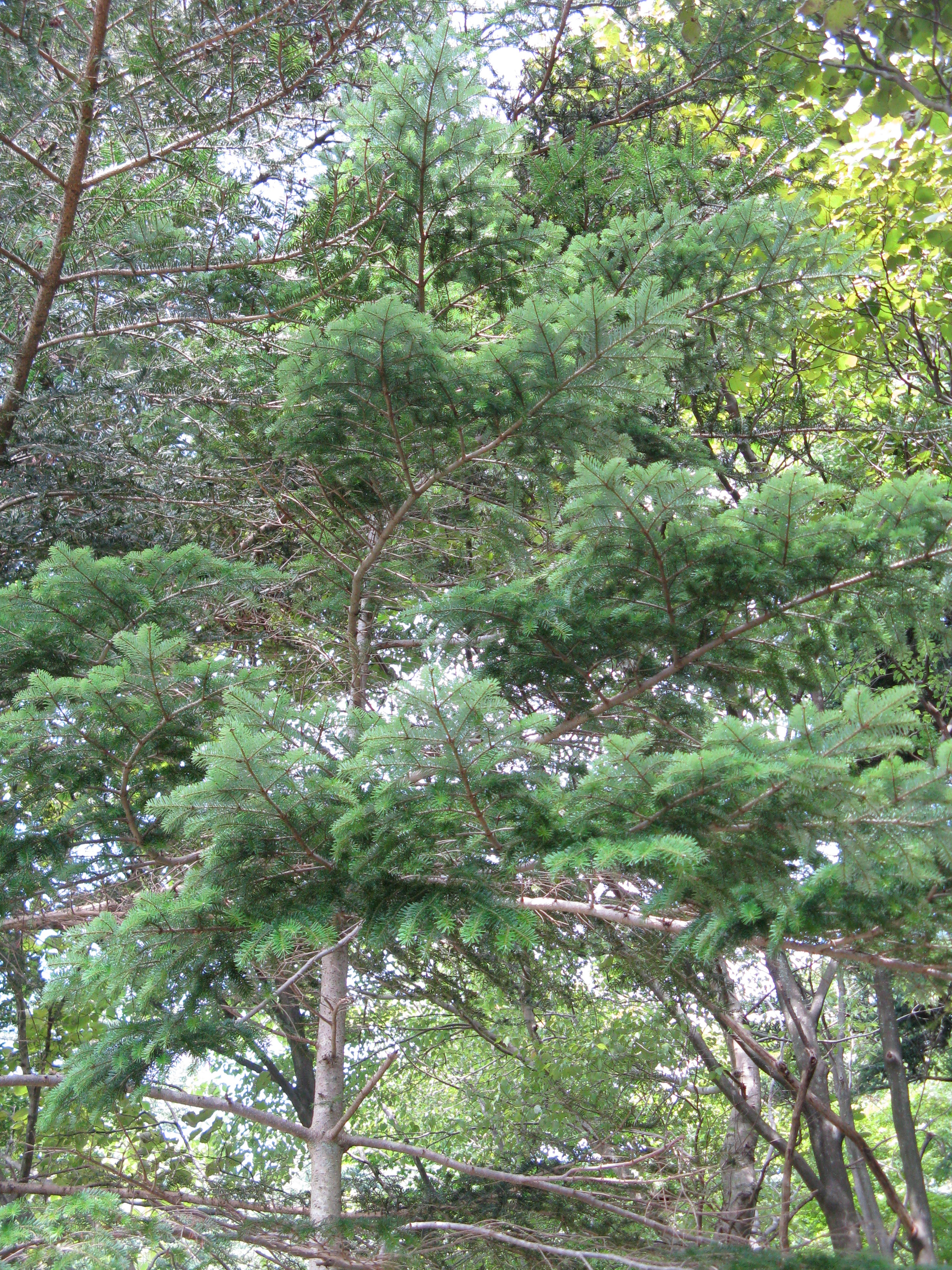 Scientific name Abies veitchii